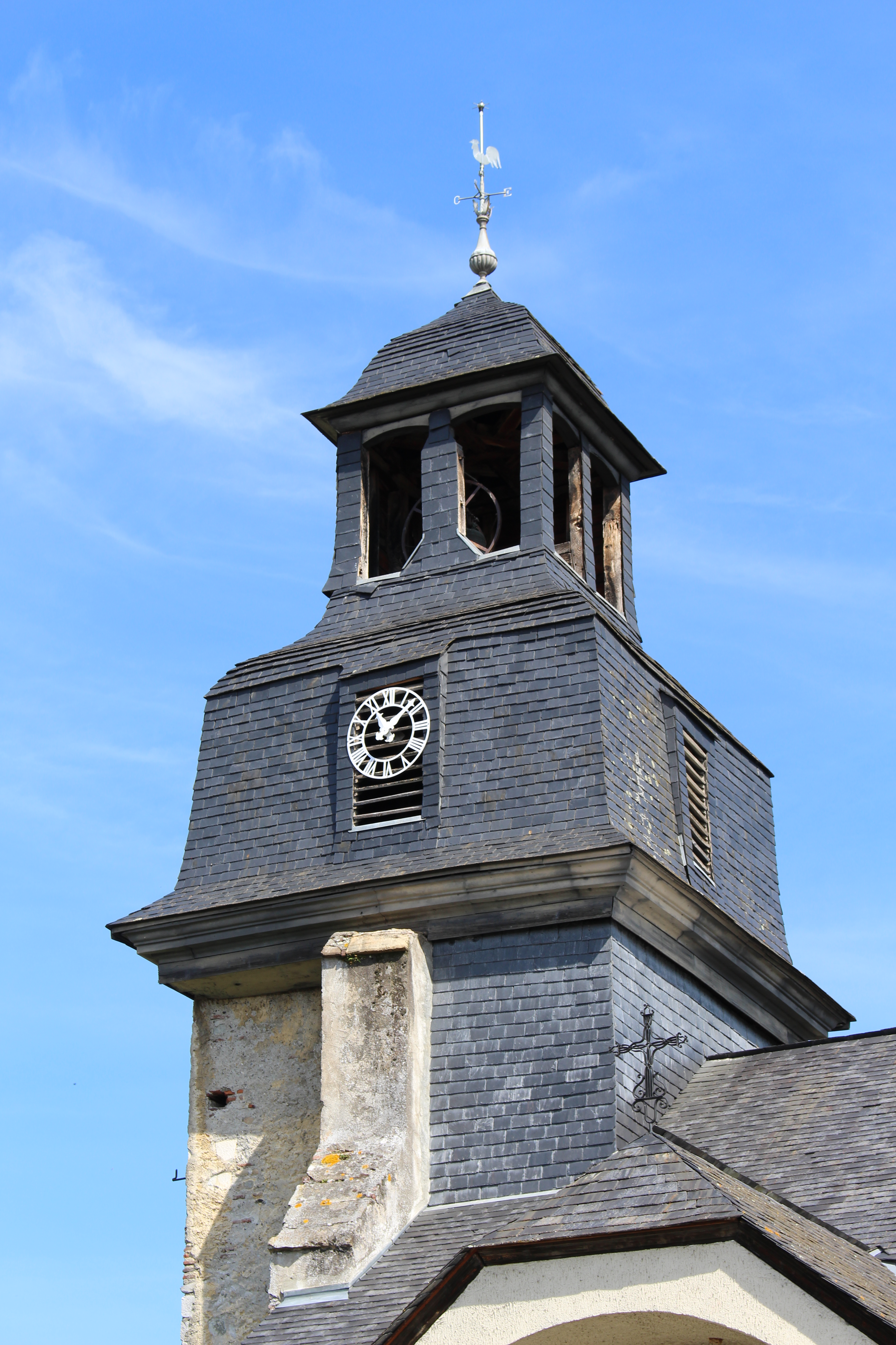 Église Saint-Barthélemy de Salles-Adour (Hautes-Pyrénées)